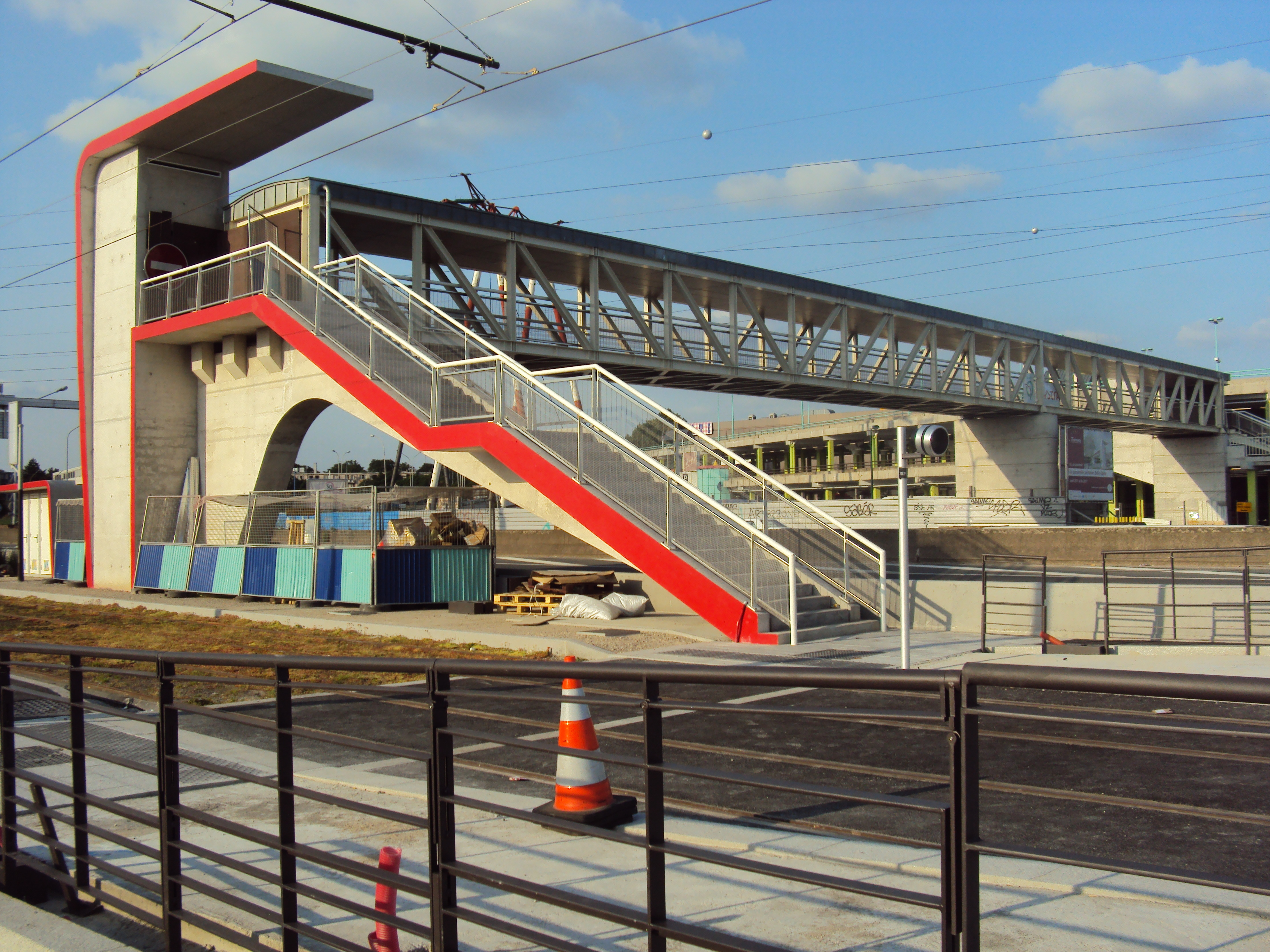 Travaux du T7 au voisinage de Belle épine